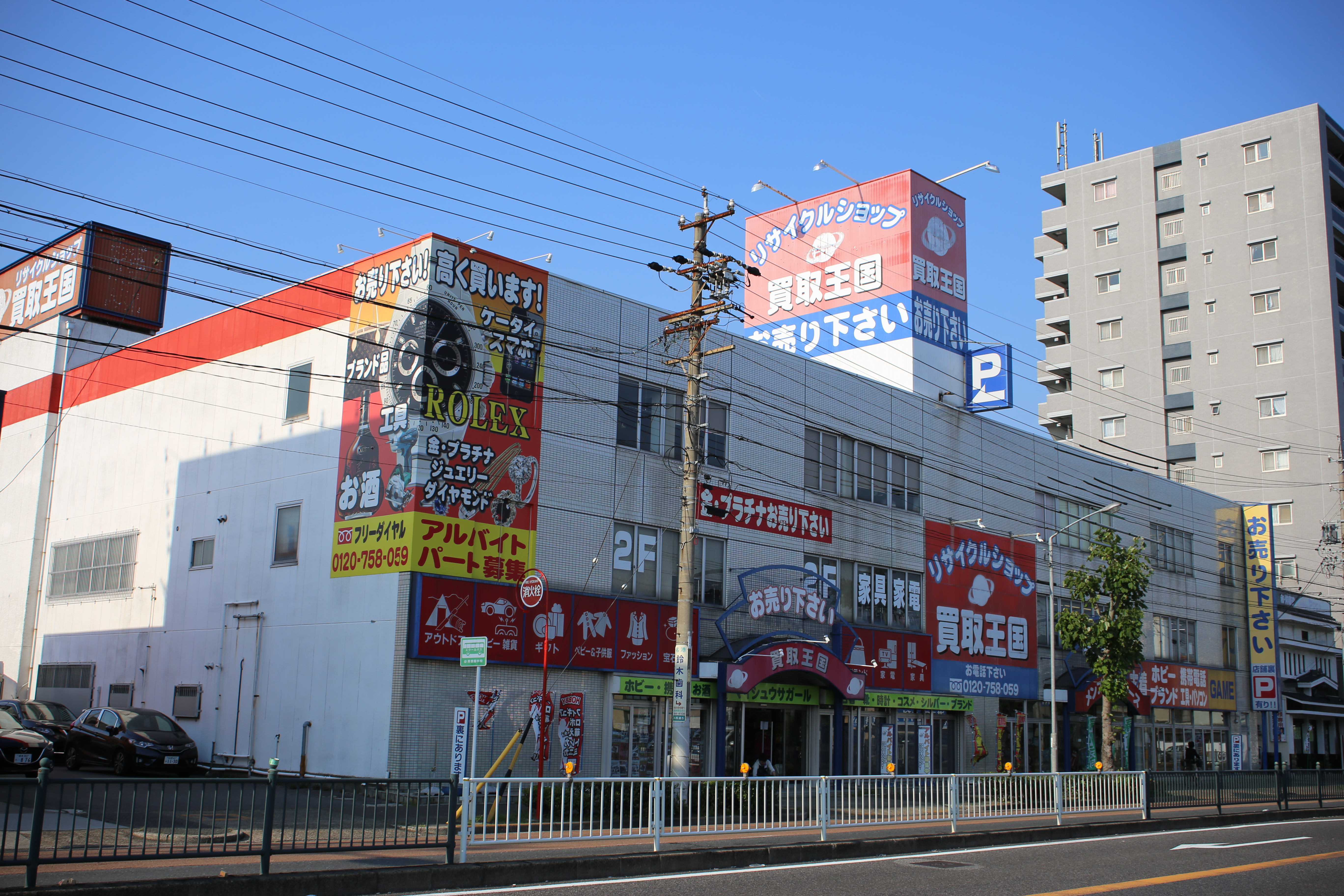 名古屋市港区川西通の買取王国本社・港店を南側公道西側より撮影